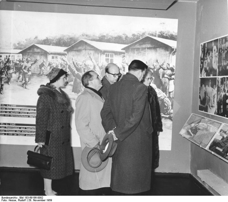 Zentralbild/Hesse, 29.11.1959 Luis Carlos Prestes besuchte Ravensbrück Der Generalsekretär der brasilianischen Kommunistischen Partei, Luis Carlos Prestes, besuchte am 28.11.1959 die nationale Mahn- und Gedenkstätte Ravensbrück. In dieses ehemalige Konzentrationslager hatten die Faschisten auch die tapfere Lebens- und Kampfgefährtin von Prestes, die deutsche Antifaschistin Olga Benario-Prestes verschleppt, die als Mitarbeiterin des Zentralkomittees des Kommunistischen Jugendverbandes stets für die Interessen der Arbeiterklasse eingetreten war. UBz: Luis Carlos Prestes (2 v.l.) bei der Betrachtung von Bilddokumenten über das ehemalige Konzentrationslager Ravensbrück 68186/2N